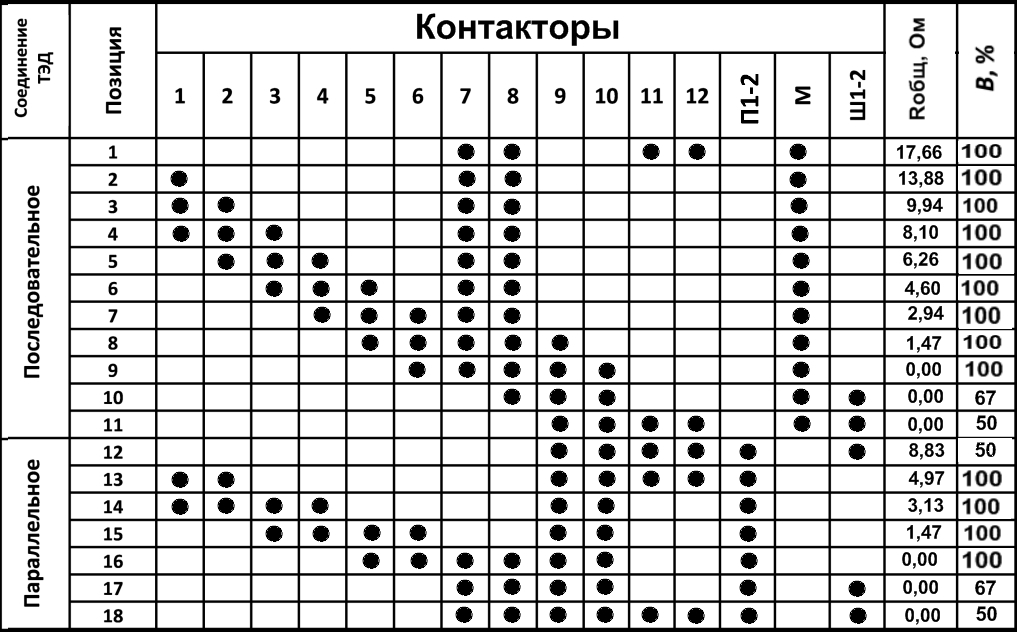 Таблица замыканий контакторов силовой схемы электропоездов ЭР и ЭР2